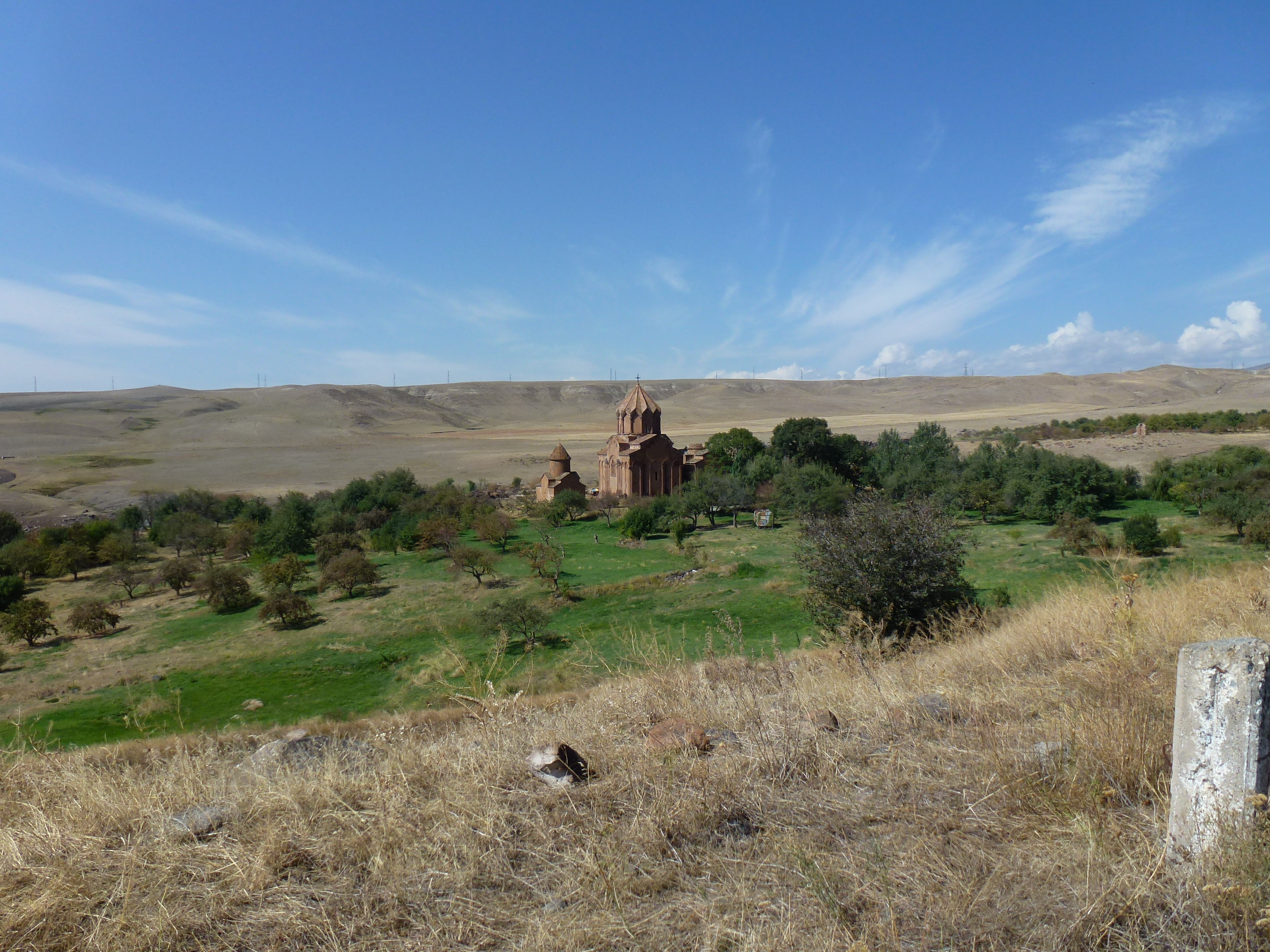 Մարմաշեն Վանական համալիր 108/10